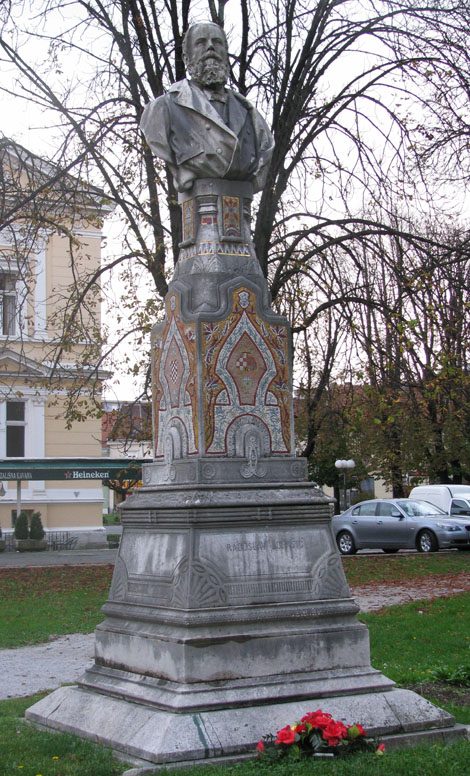 Spomenik Radoslavu Lopašiću u Karlovcu, rad Ivana Rendića